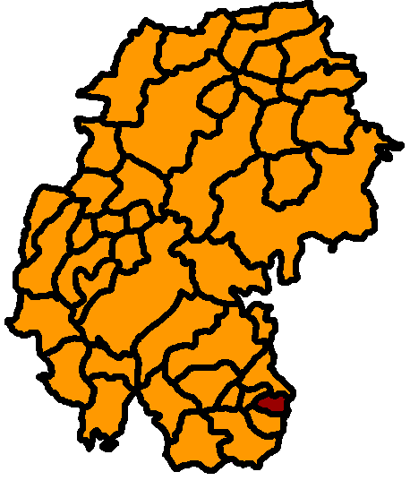 Wildenspring hervorgehoben, Ilm-Kreis